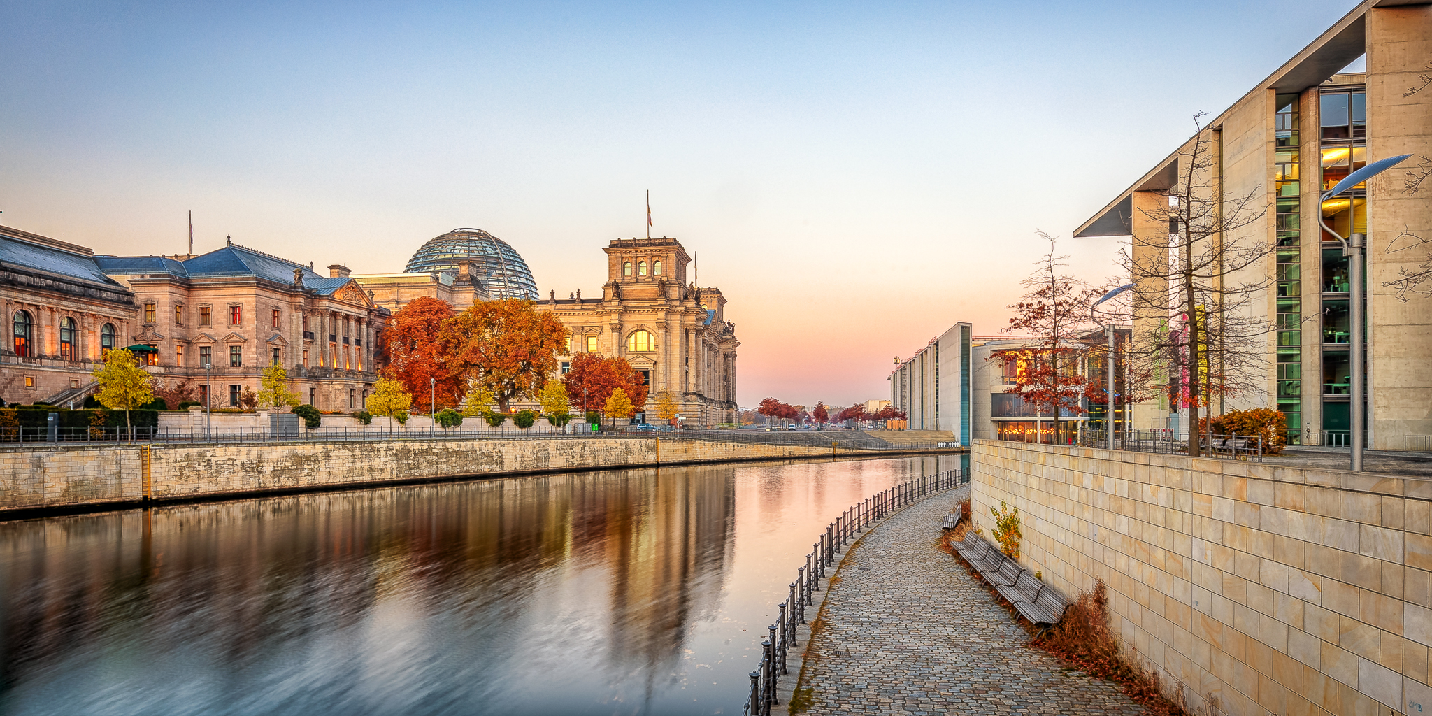 Sonnenaufgang im Regierungsviertel. Die Sonne taucht die Gebäude in schönes goldenes Morgenlicht.